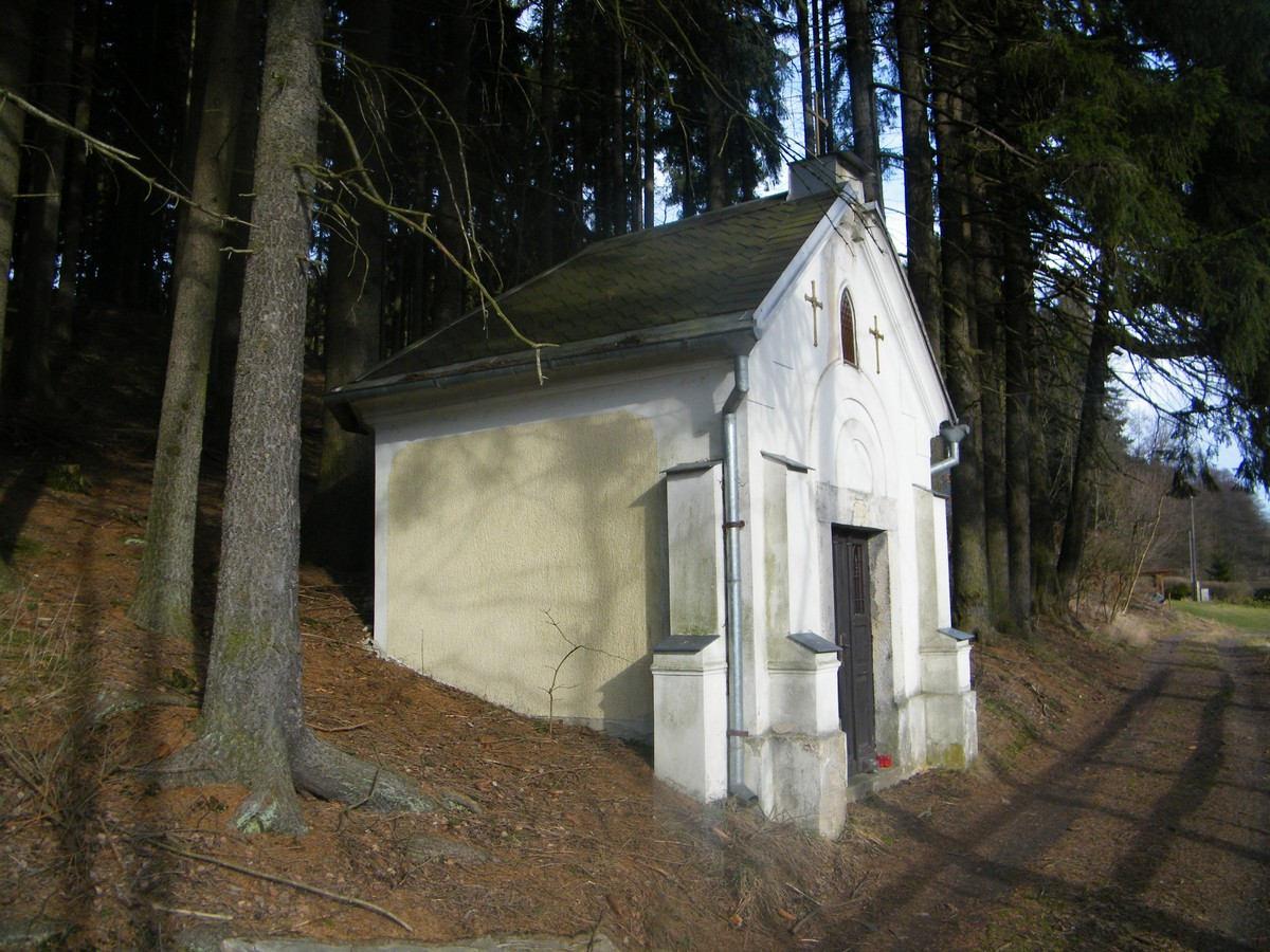 Kaple Panny Marie v osadě Kopec, Brtníky